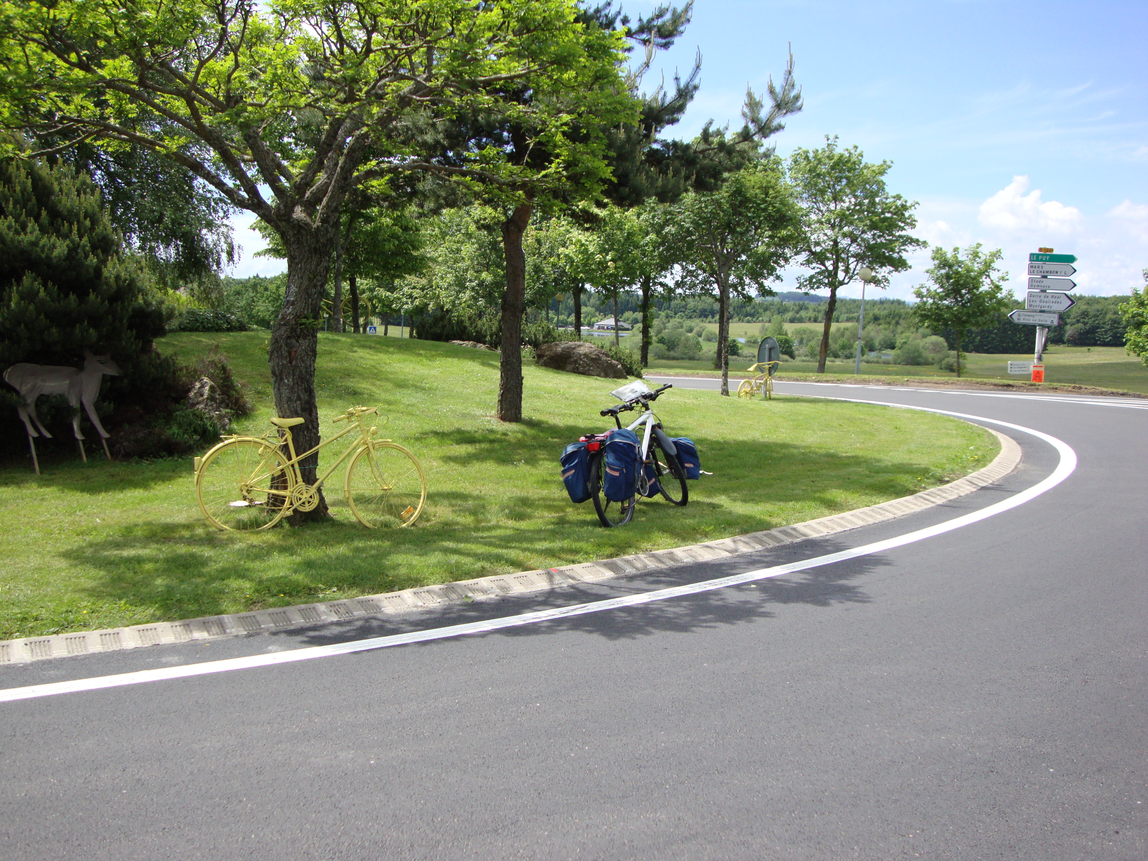 St.Agrève (Ardêche, Fr) art au rond-point